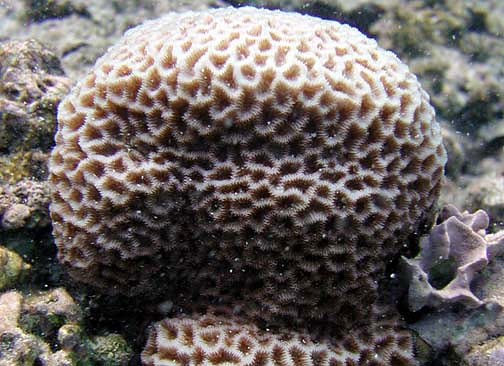 Goniastrea favulus, en Samoa Americana